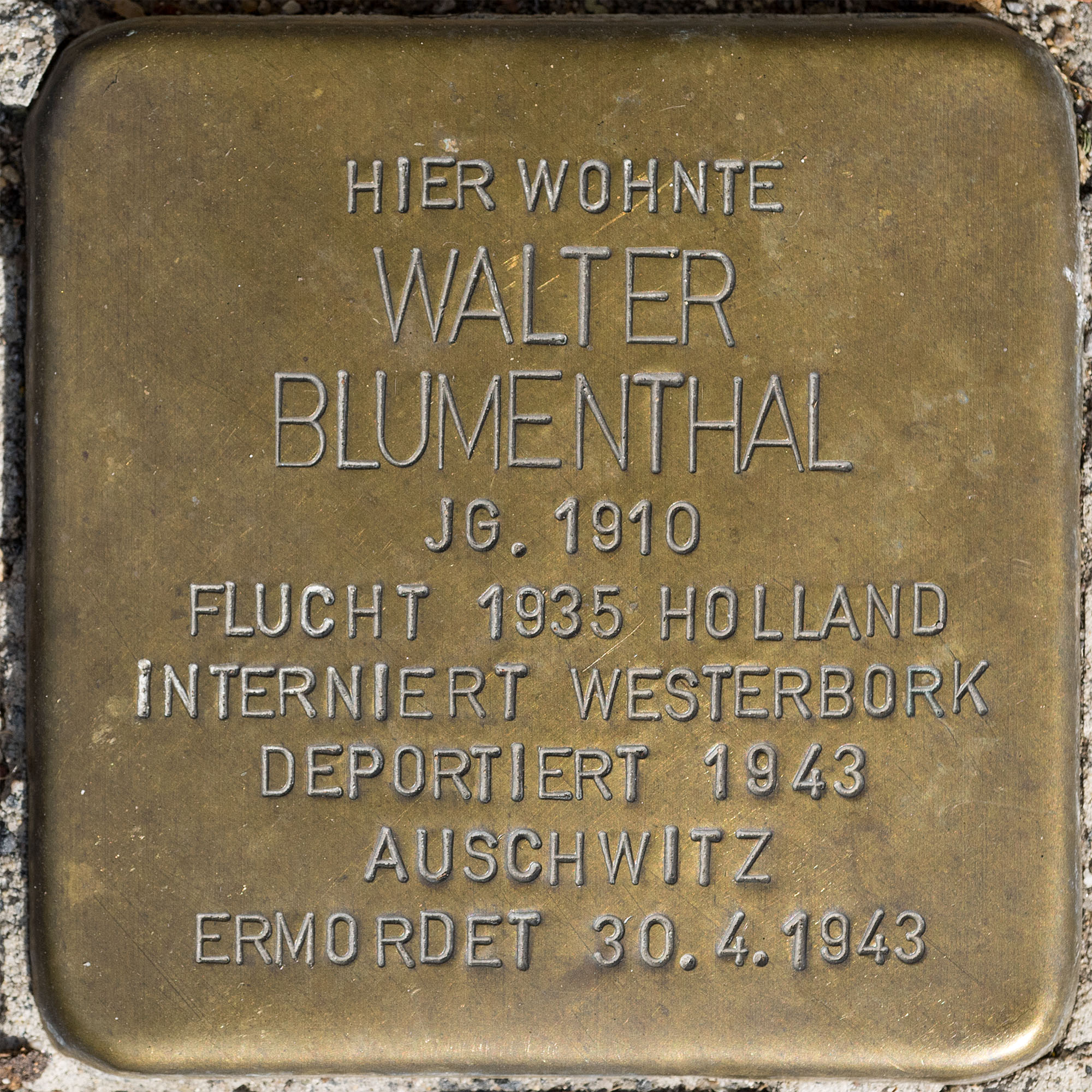 Stolpersteine MG: Blumenthal, Walter